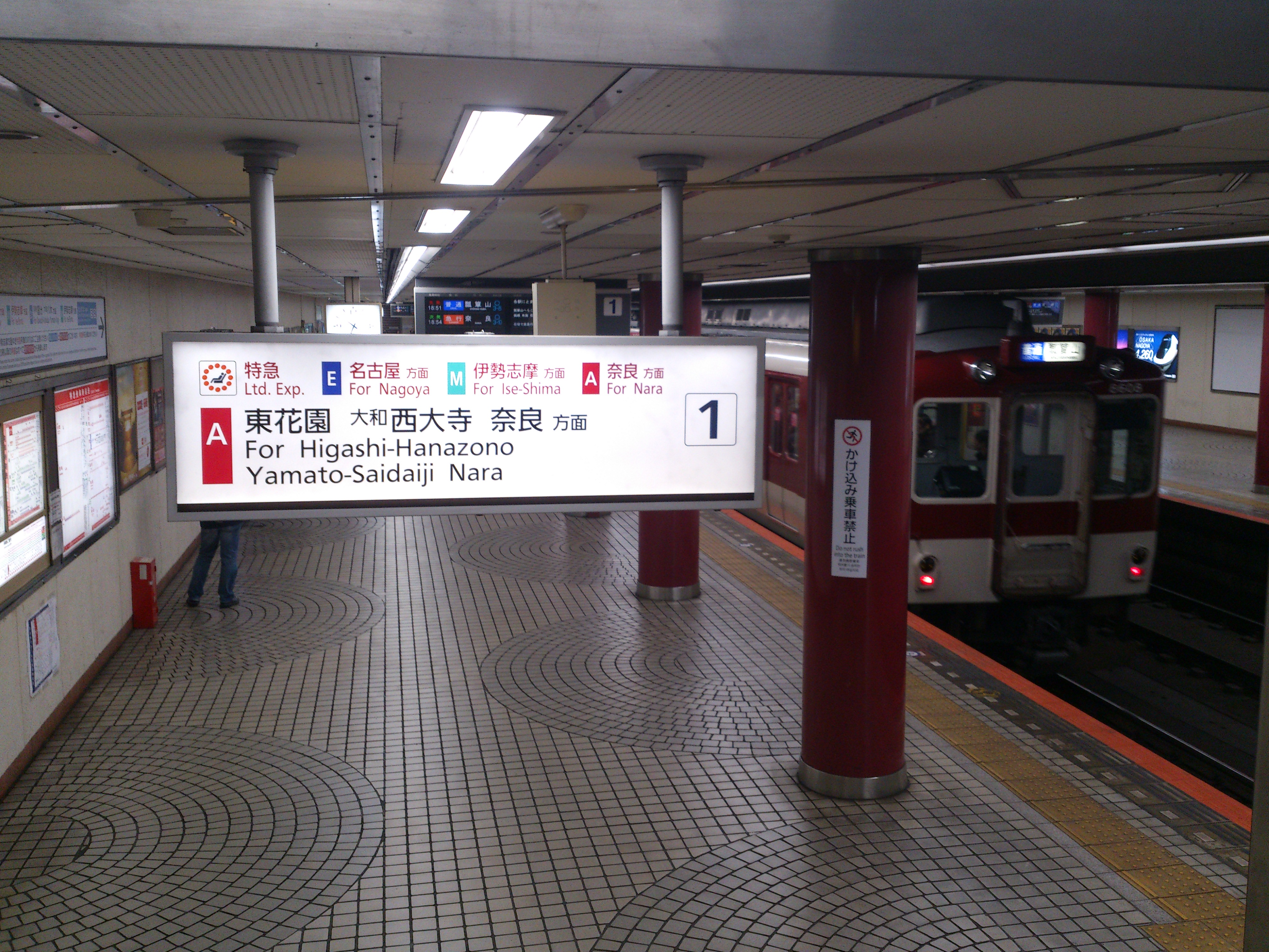 大阪上本町駅 地下ホーム